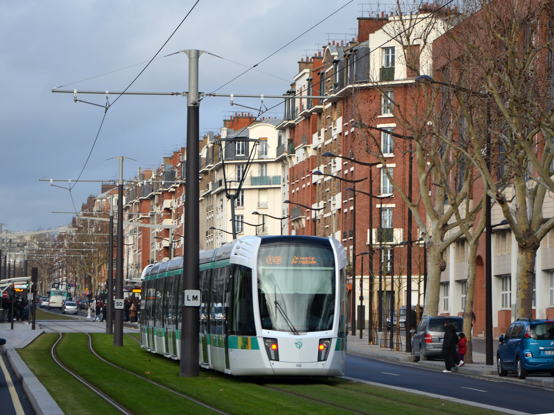 Rame de tramway de la ligne T3b sur le Boulevard Davout, Paris, Ile de France, France